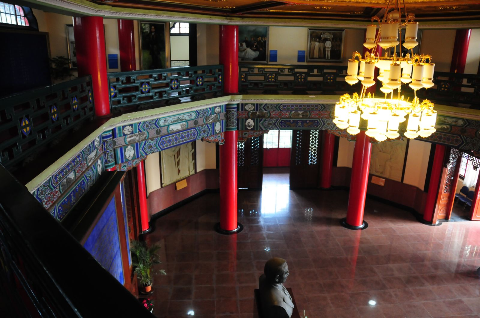 南京中山陵藏经楼，孙中山纪念馆，内部